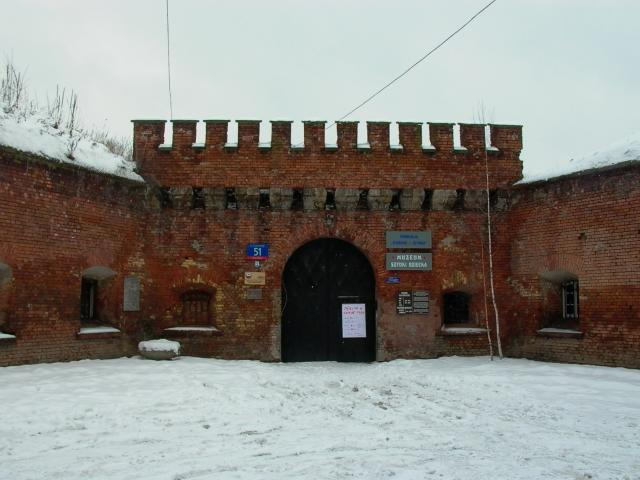 Zdjęcie przedstawia szyję działobitni w Forcie Siergieja (Sokolnickiego) Cytadeli Warszawskiej. Autor: Zbigniew Strucki. Data wykonania: 30.I.2007